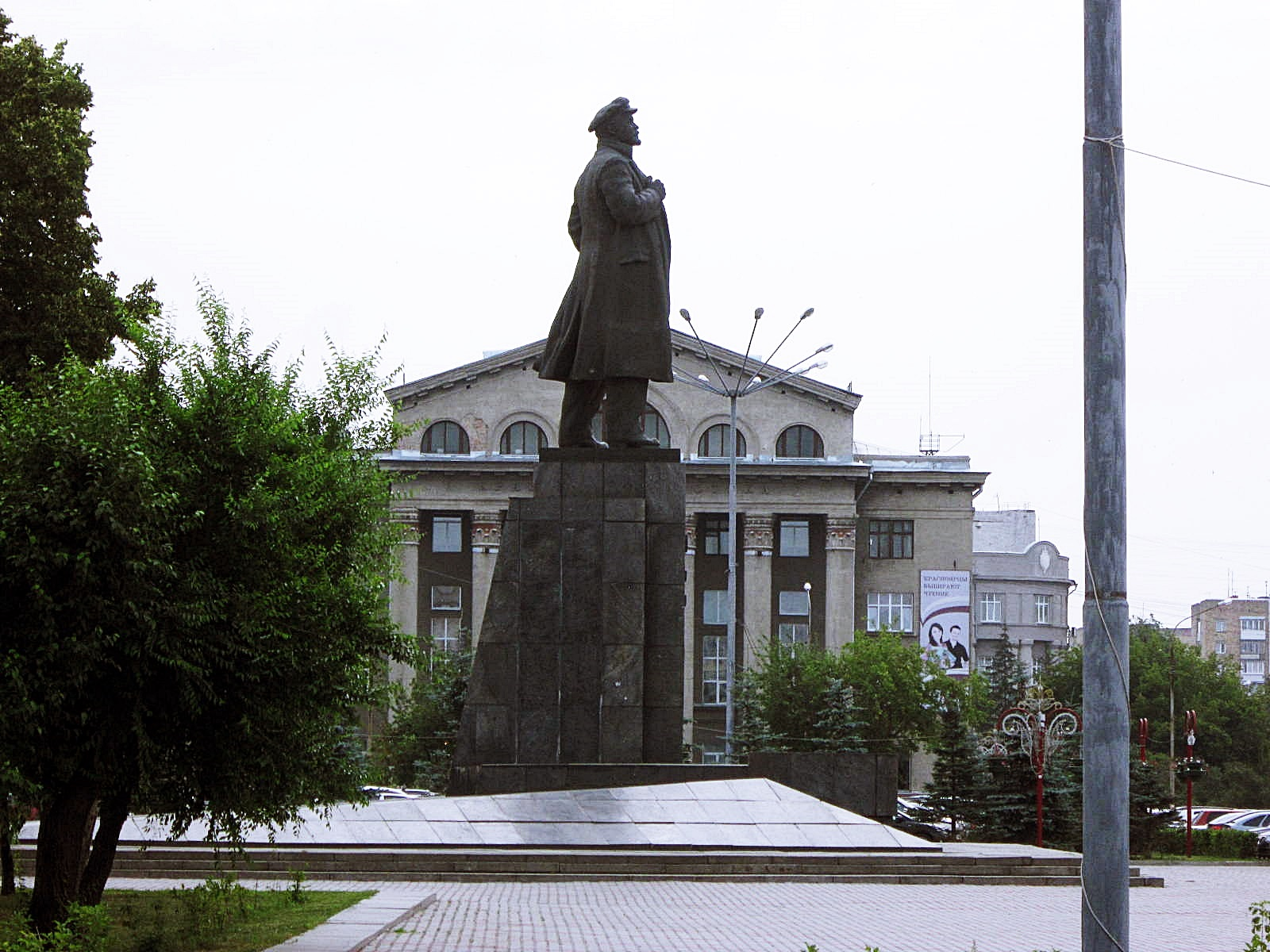 Памятник В. И. Ленину.